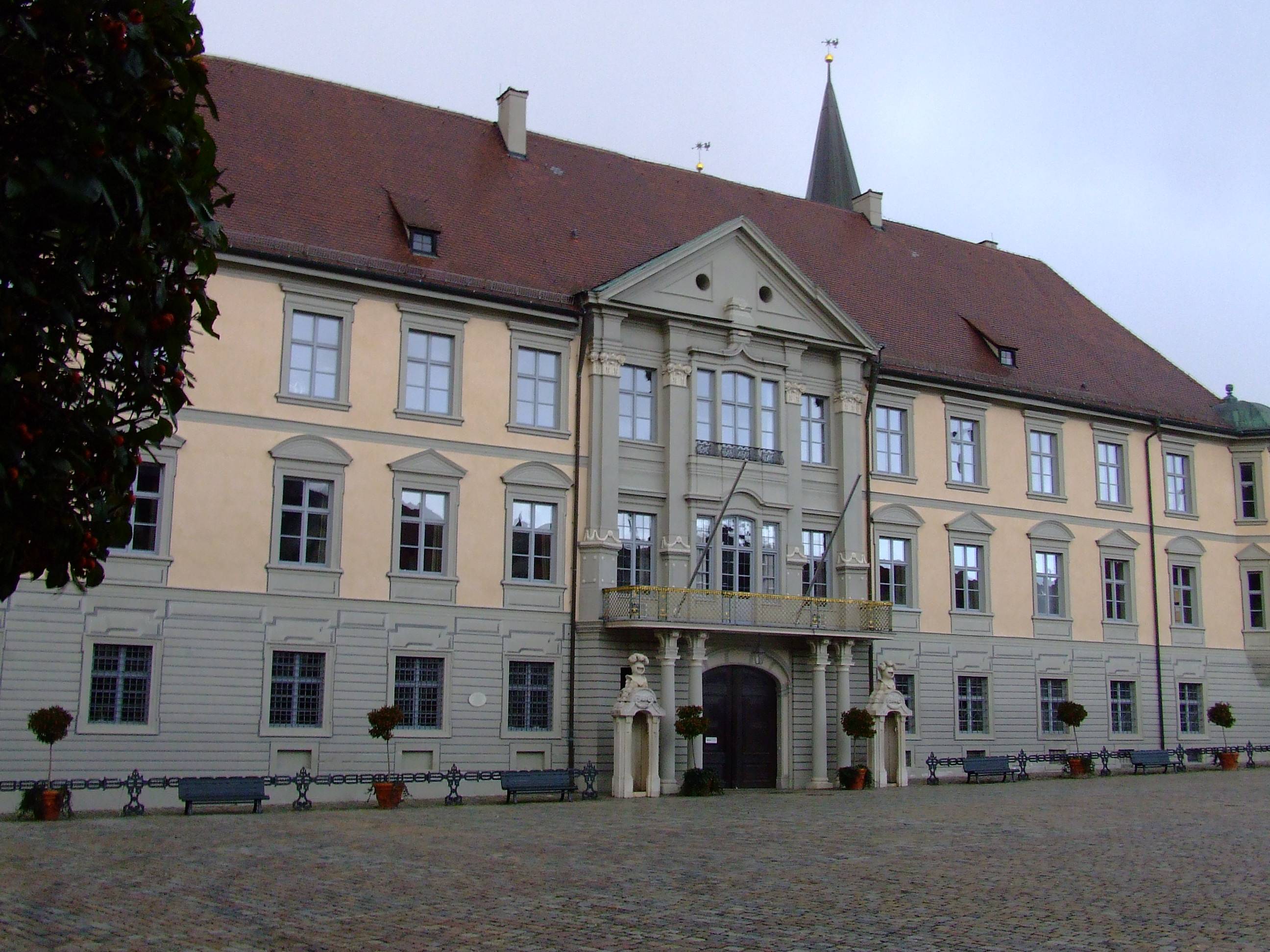 Residenz Eichstätt von Süden / Residenzplatz